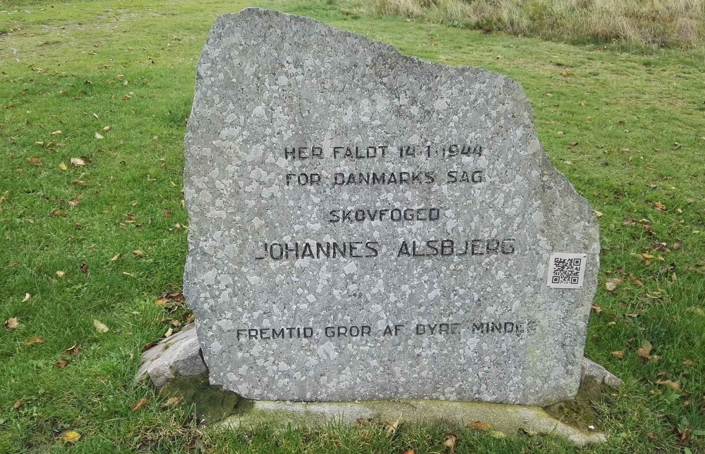 Mindesten ved Birkesø nordøst for Stoholm med inskriptionen:"Her faldt 14/1 1944 for Danmarks sag skovfoged Johannes AlsbjergFremtid gror af dyre minder"Mindestenen blev i 2015 flyttet hertil fra det sted ved skovfogedboligen, hvor han faktisk døde.